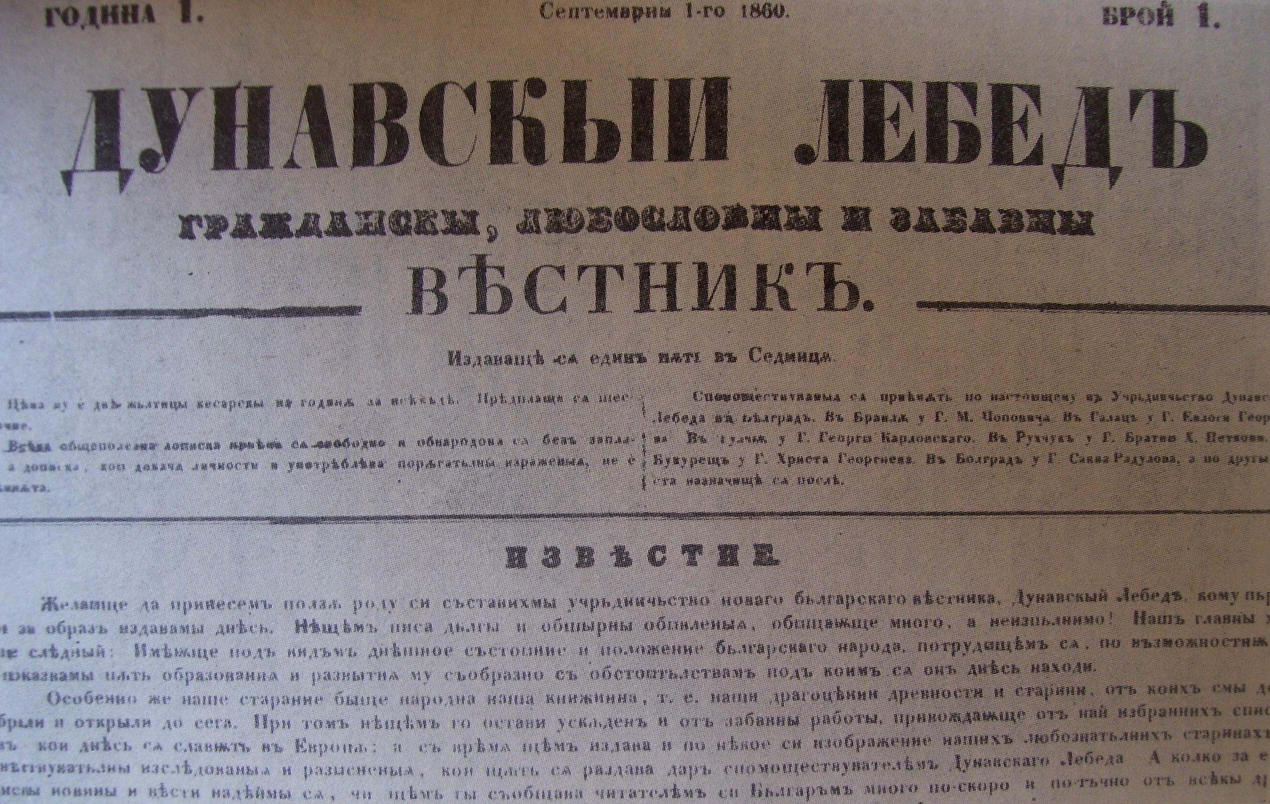 Брой 1 на вестник Дунавски лебед.